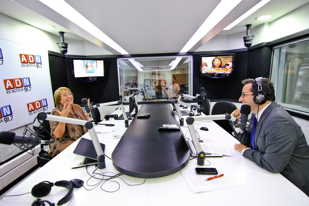 Entrevista a Michelle en Radio ADN 21/11/2013